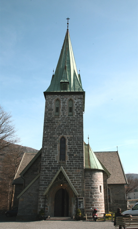 Årstad kirke